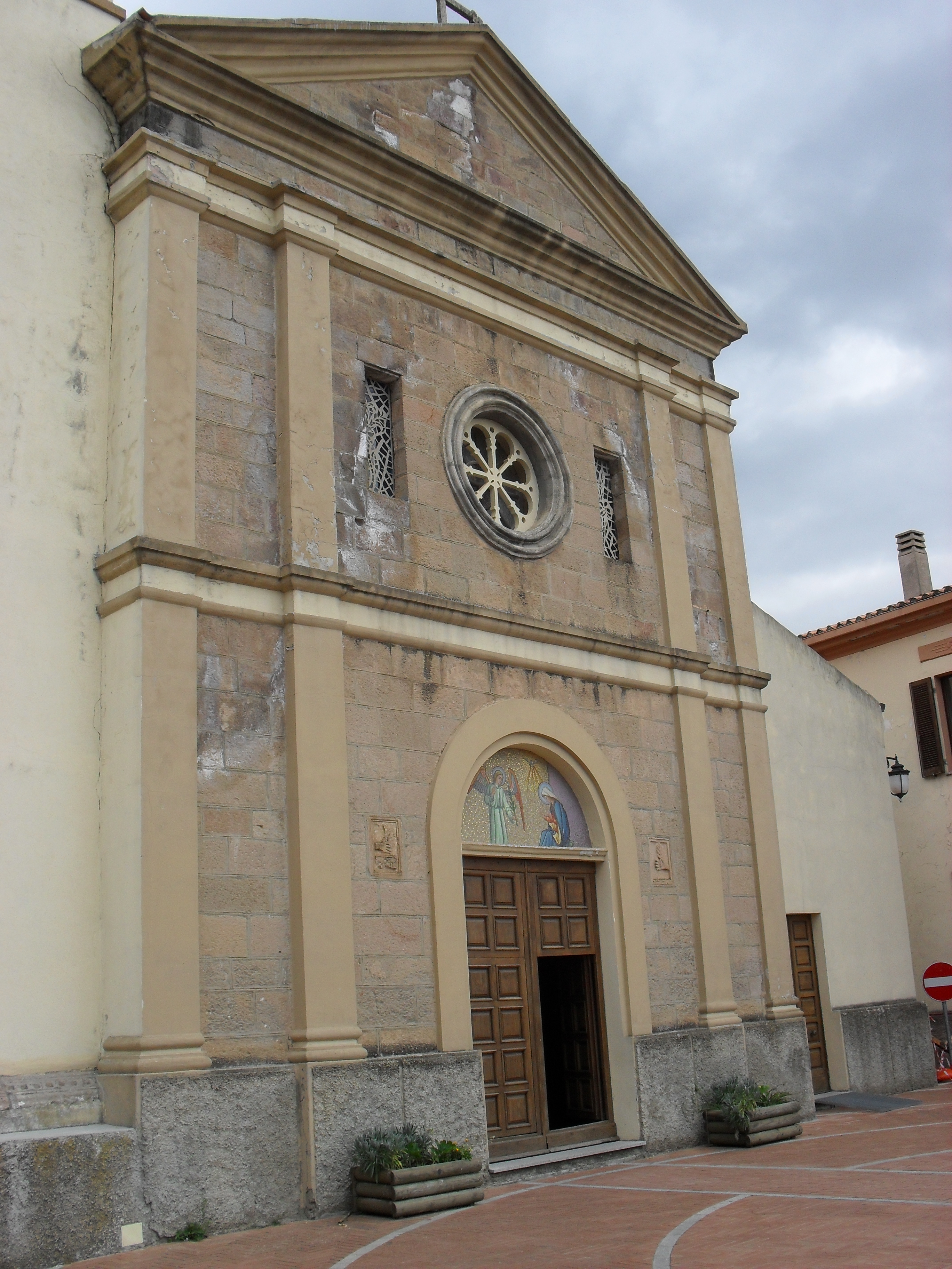 Facciata della chiesa di San Gabriele, parrochiale di Tonara (NU)